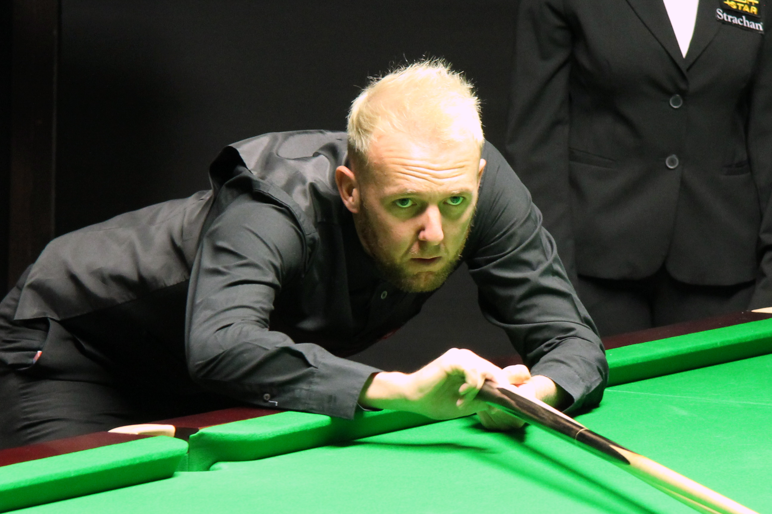 Adam Duffy beim Paul Hunter Classic 2016